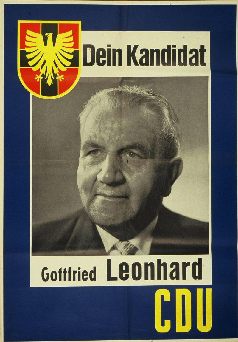 Dein Kandidat Abbildung: Porträtfoto Kommentar: evtl. auch BTW 1961? Plakatart: Kandidaten-/Personenplakat mit Porträt Objekt-Signatur: 10-001: 682 Bestand: Plakate zu Bundestagswahlen (10-001) GliederungBestand10-18: Plakate zu Bundestagswahlen (10-001) » Die 3. Bundestagswahl am 15. September 1957 » CDU » Mit Porträtfoto Lizenz: KAS/ACDP 10-001: 682 CC-BY-SA 3.0 DE